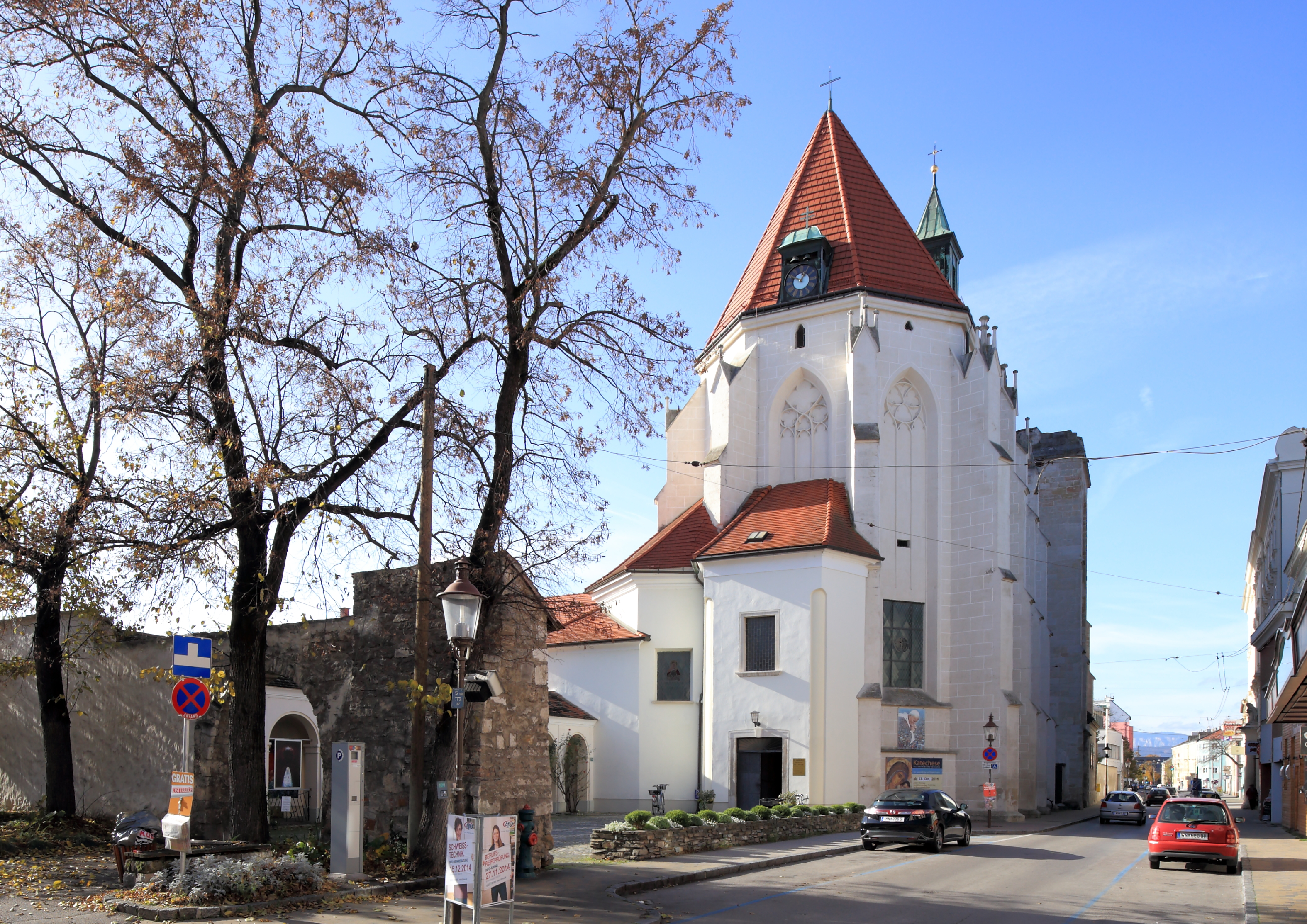 Nordostansicht der Kapuzinerkirche und ehemalige Minoritenkirche (um 1330) in der niederösterreichischen Bezirkshauptstadt Wiener Neustadt.